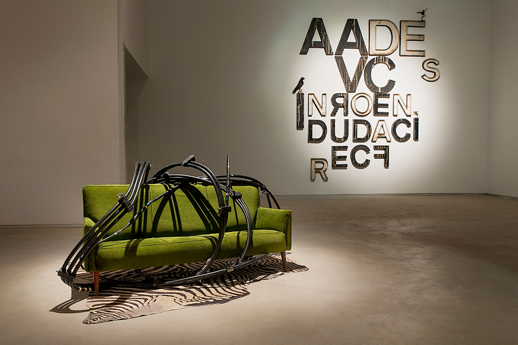 Exposición en el Centro de Arte Lo Pati en Amposta. Octubre de 2015